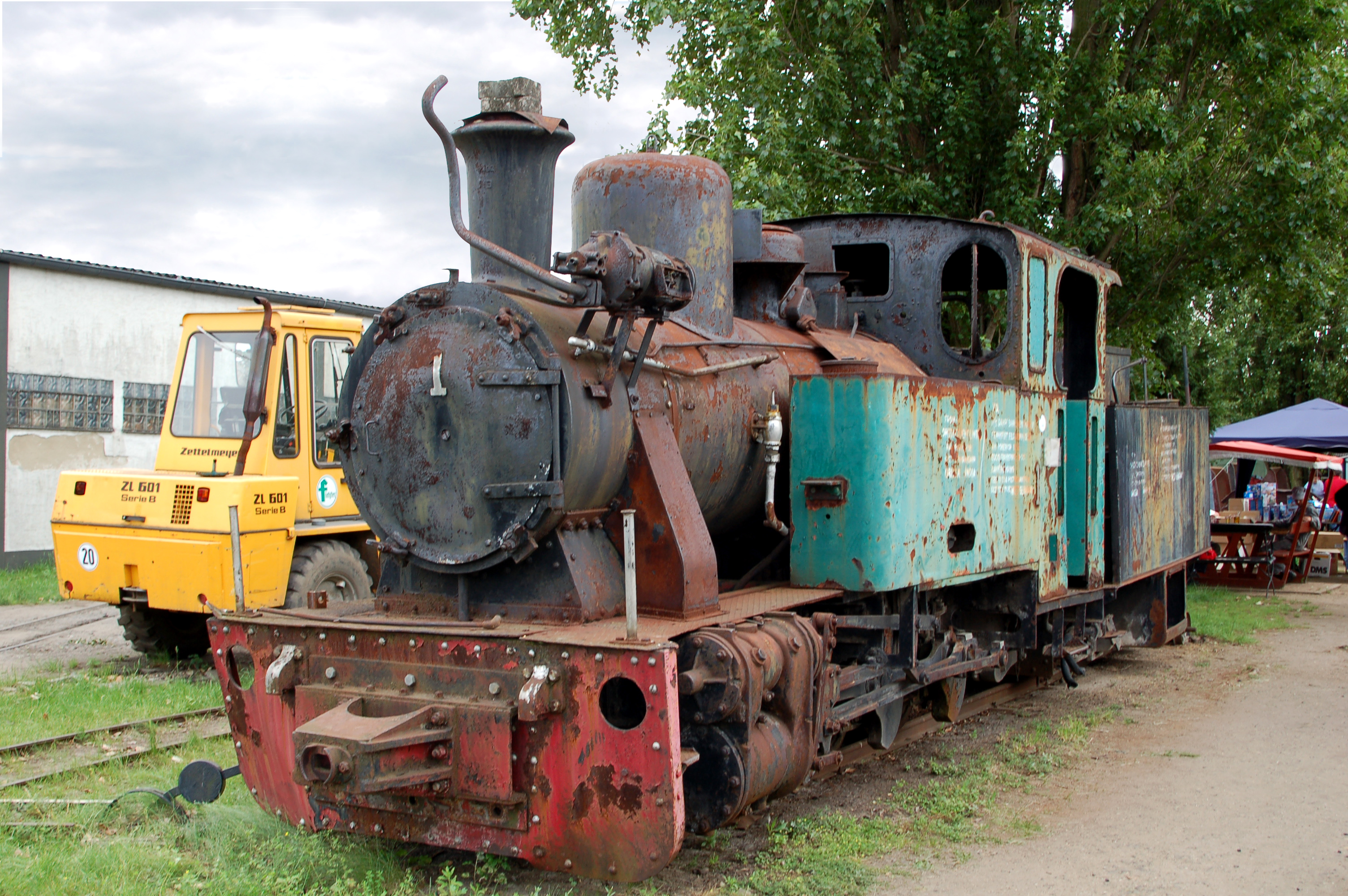 Lok Jung HF 110 C des Frankfurter Feldbahnmuseums (No. 10142, 1950)